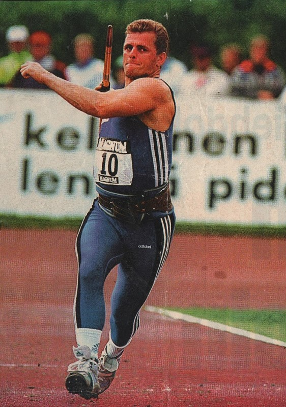 Jari Hartikainen Pihtiputaan keihäskarnevaaleilla 1995.